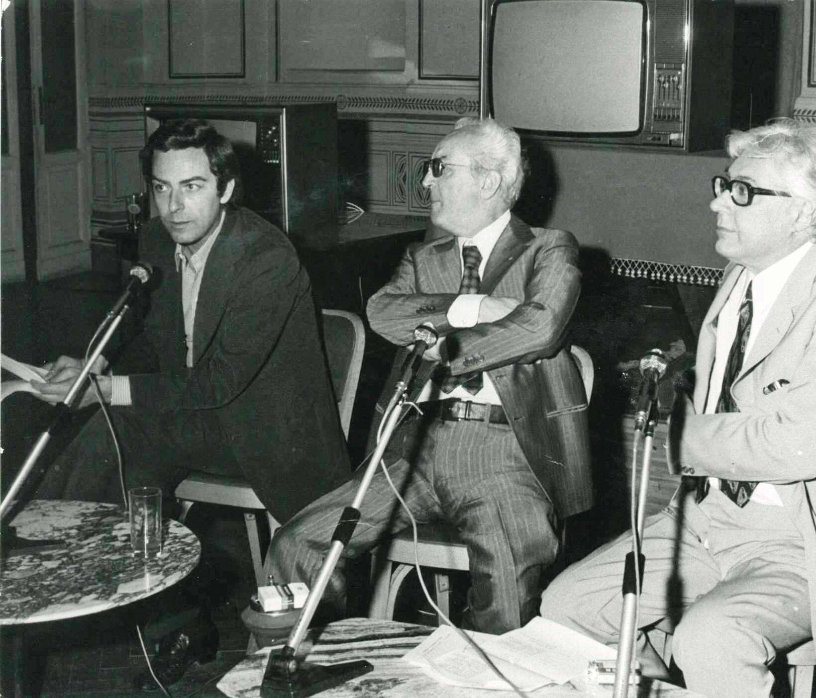 Gli scrittori Piero Chiara (al centro) e Luigi Silori (a destra), con il presentatore TV Daniele Piombi (a sinistra). Milan, Italy, 1973